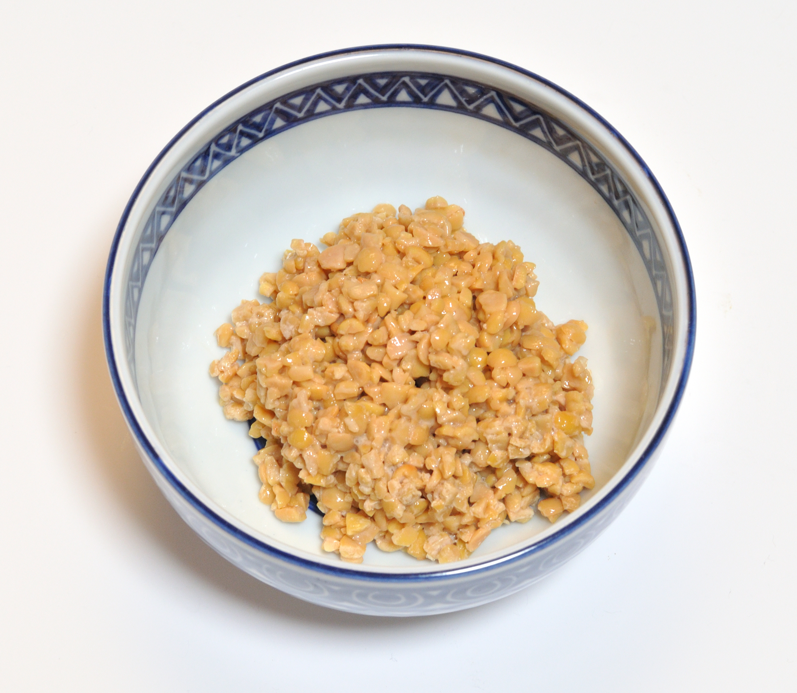 おかめ納豆のひきわり納豆